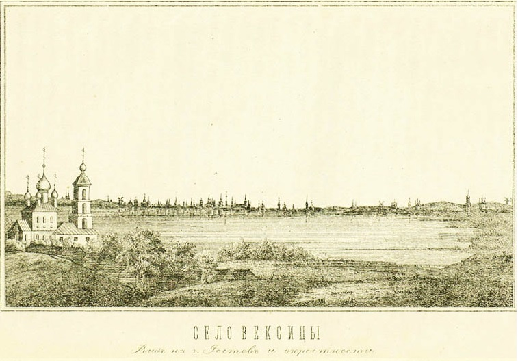 Иллюстрация с селом Вексицы из книги А. Титова "Ростовский уезд Ярославской губернии. Историко-Археологическое и статистическое описание с рисунками и картой уезда" Москва. Синодальная типография. 1885 г.